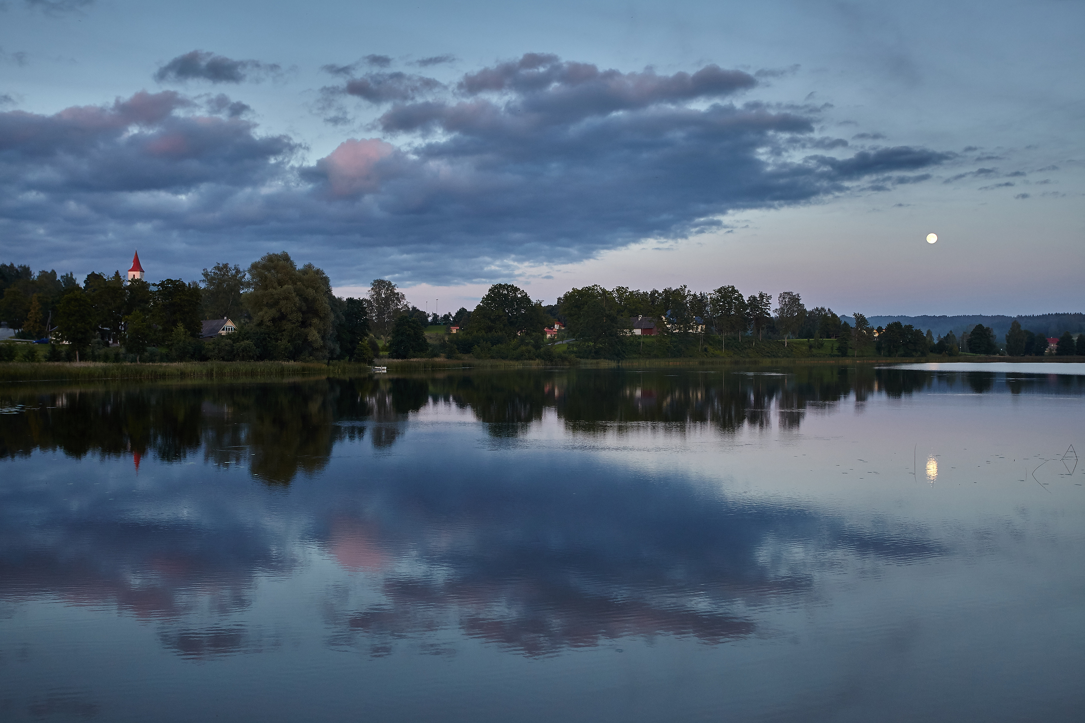 Rõuge Suurjärv